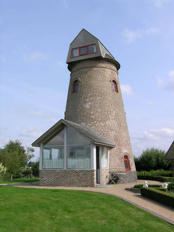 kalsijdeweg 34